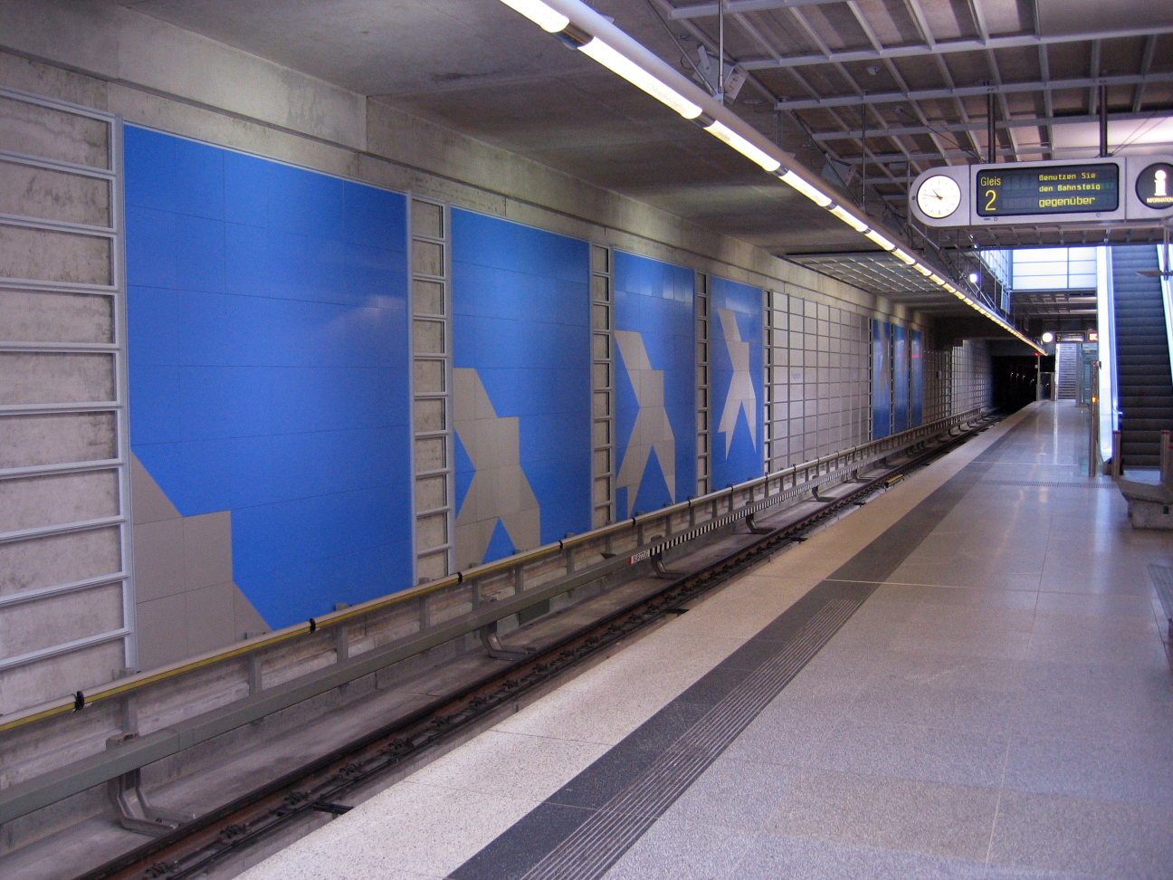 U-Bahnhof Flughafen der U-Bahn Nürnberg, Bahnsteigebene, Blick von Westen